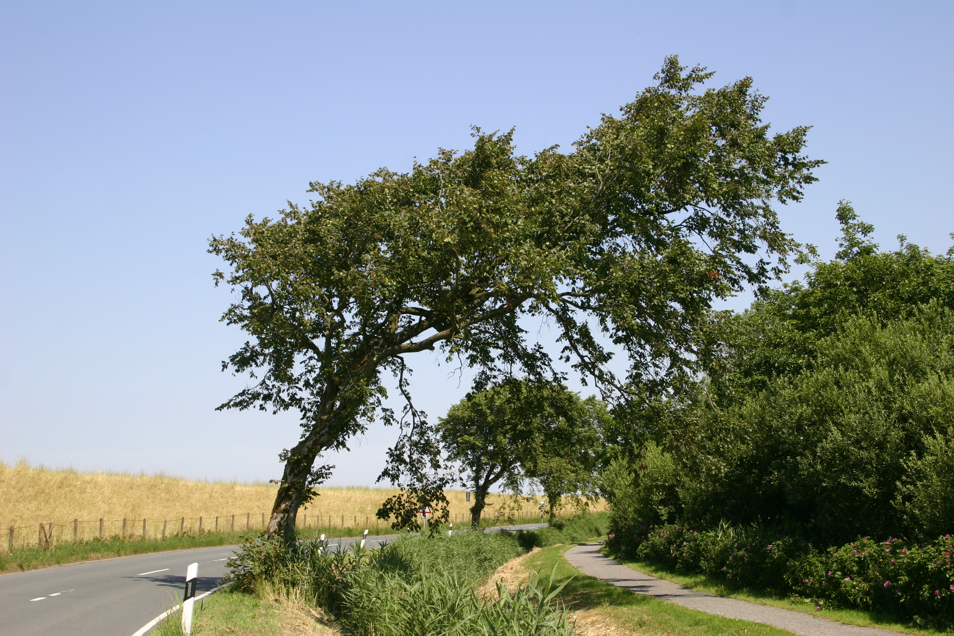 "Windlooper" (Windläufer) nahe Esens-Gründeich (LK Wittmund, Ostfriesland, Niedersachsen). Durch die starken Winde von See (aus NW bis SW) wurde der Baum während seines Wachstums gebeugt (Nordsee auf diesem Bild linker Hand hinter dem Deich).